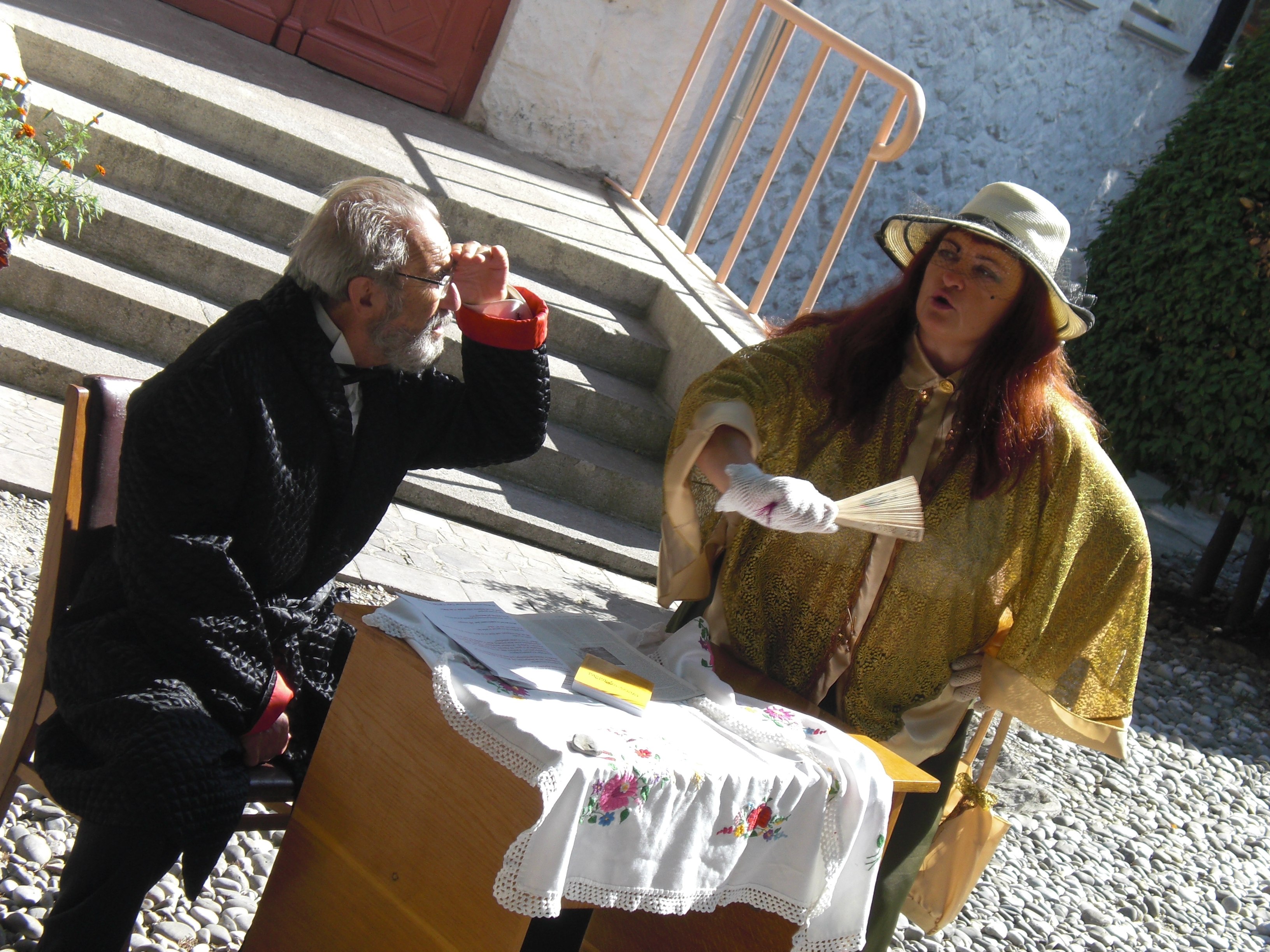 Teatraĵo "Длинный язык" ("Longa lango") de Anton Ĉeĥov en esperantlingva prezento, montrata en Jalto dum la SAT-Kongreso en 2012 kun aktorado de Jefim Zajdman kaj la reĝisorino Svetlana Skvorcova